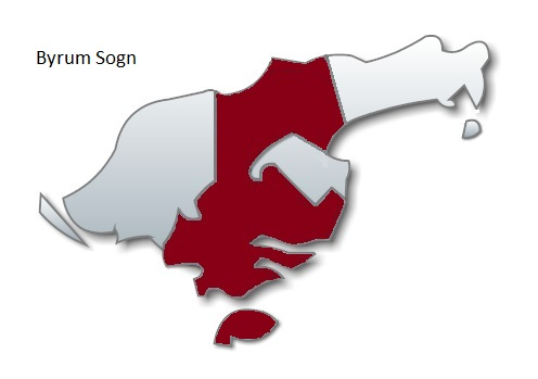 Byrum Sogn på Læsø